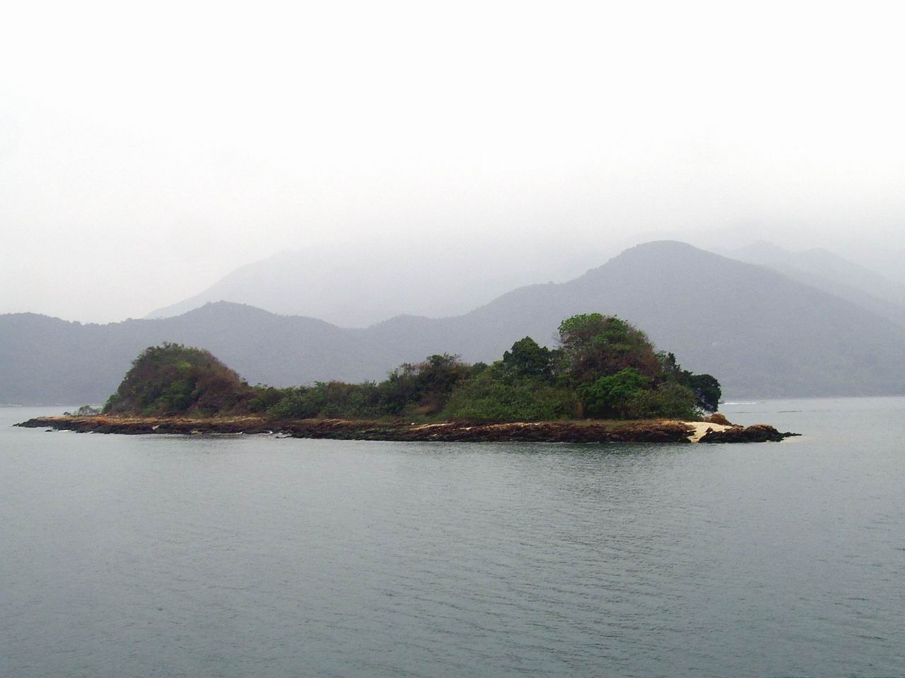 三杯酒